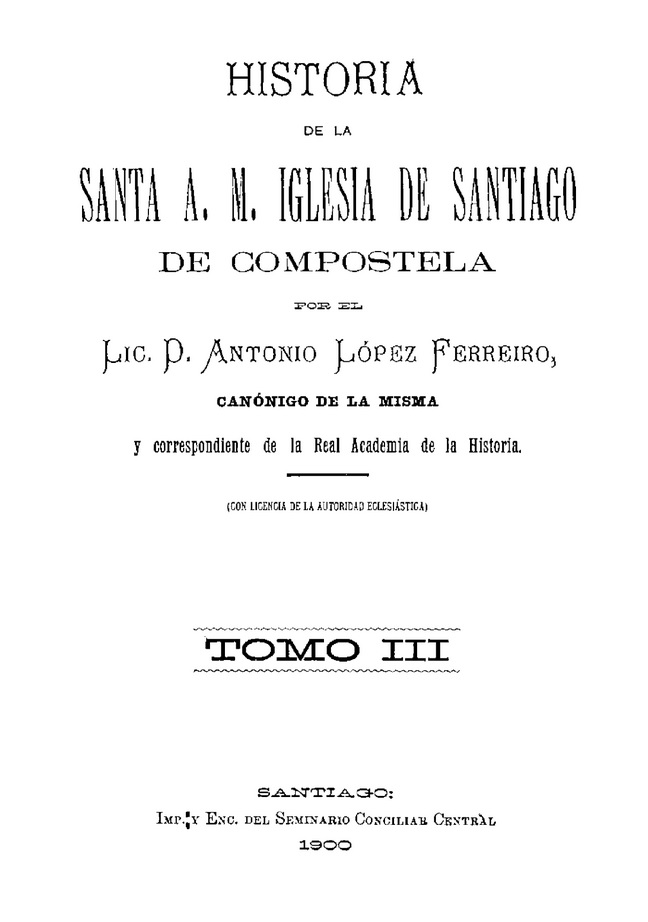 Historia de la Santa A. M. Iglesia de Santiago de Compostela. Tomo III.